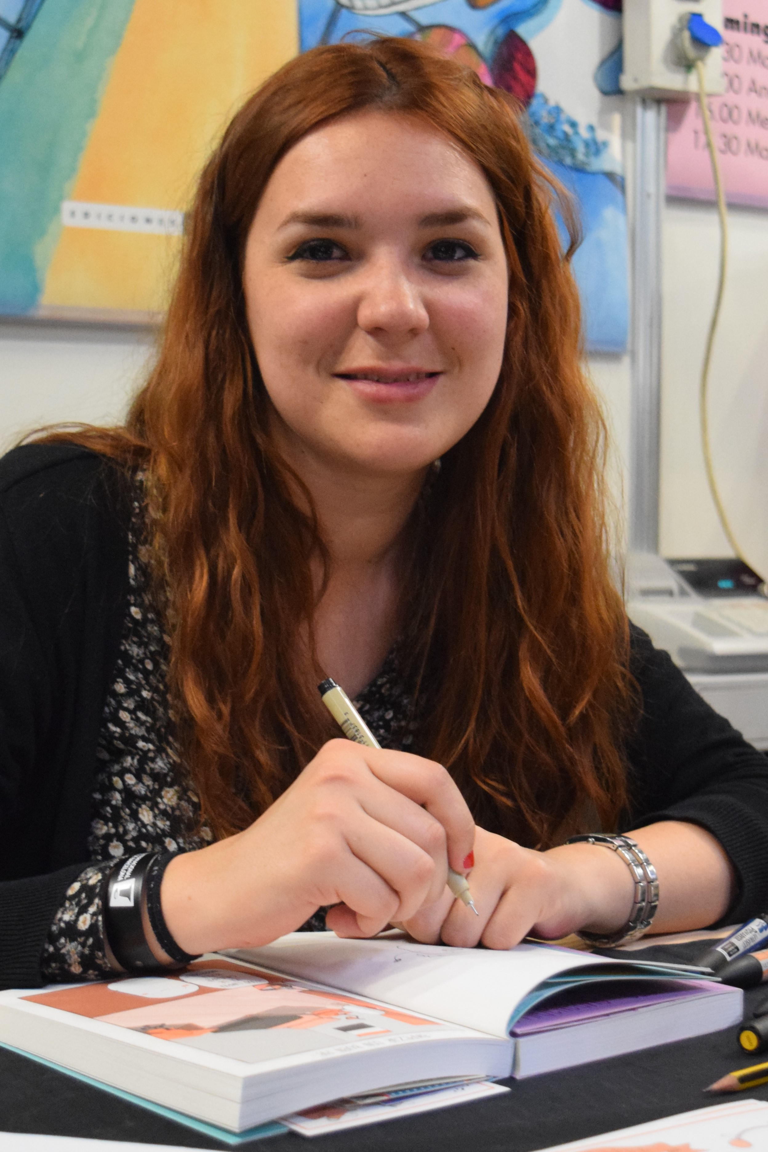 Ana Oncina firmant exemplars de Croqueta y empanadilla. Saló Internacional del Còmic de Barcelona de 2017. Divendres 31 de març de 2017.